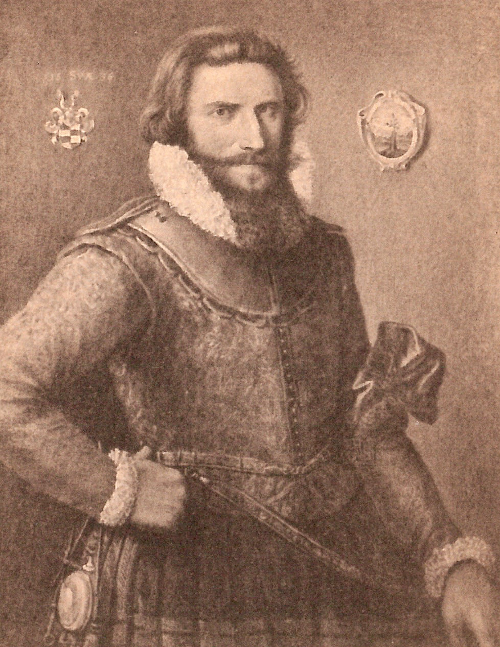 Hr. Anders Bille til Rosendal, Ridder og Rigsraad, f. 1580 † 1633